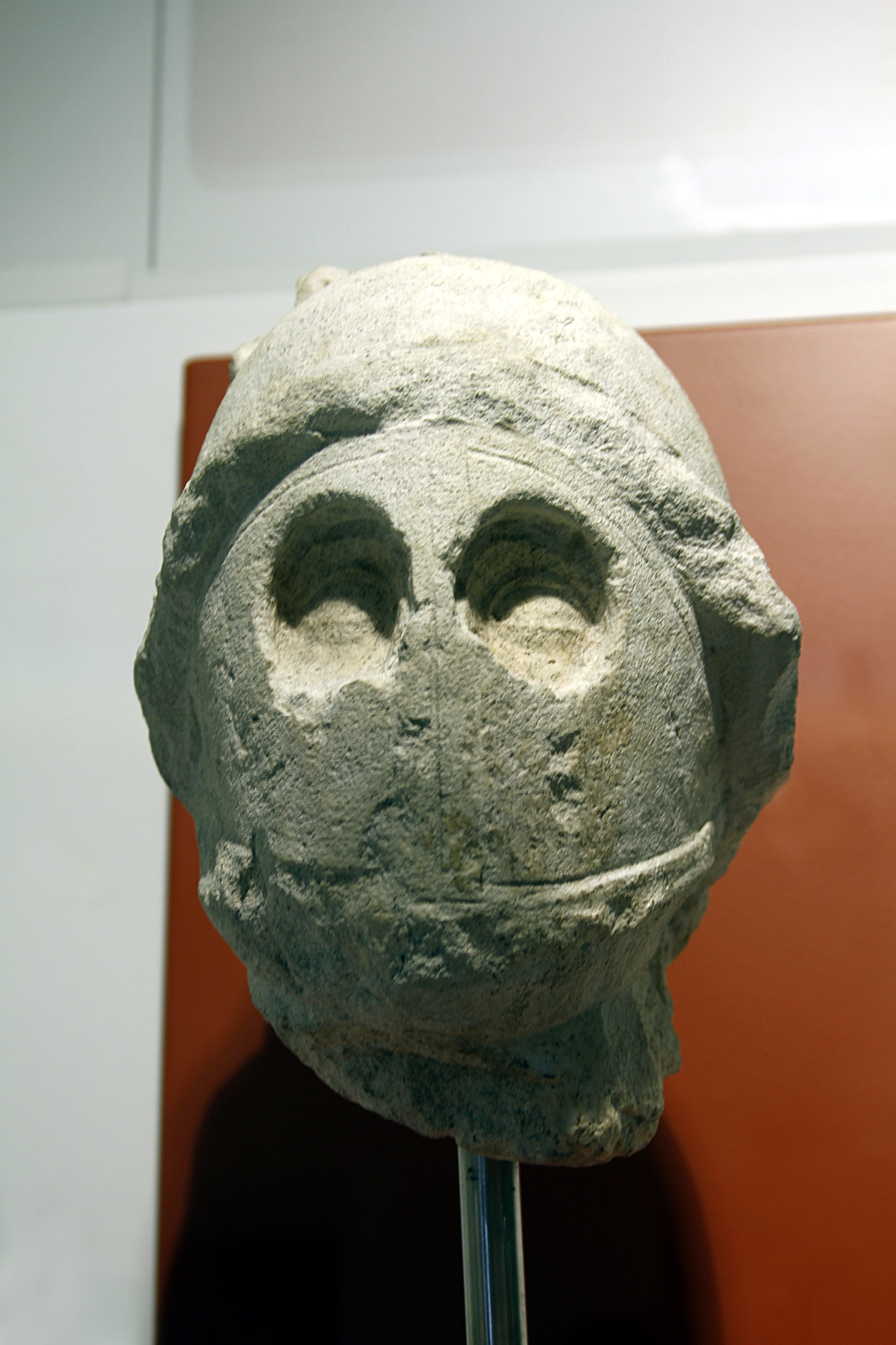 Archeological Museum of Verona - Verona